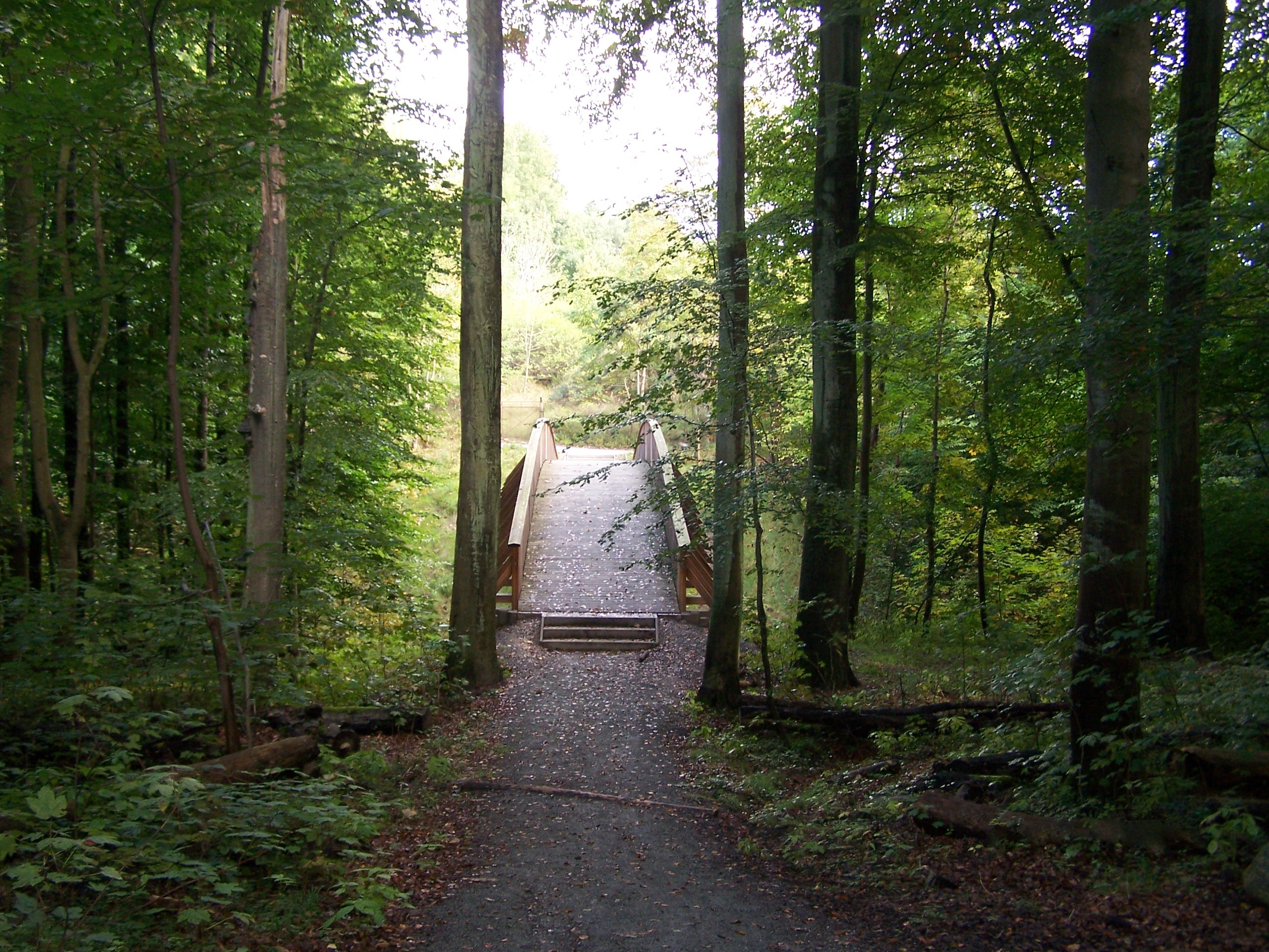 Sassnitz, Brücke zum Dwasiedener Schlosspark